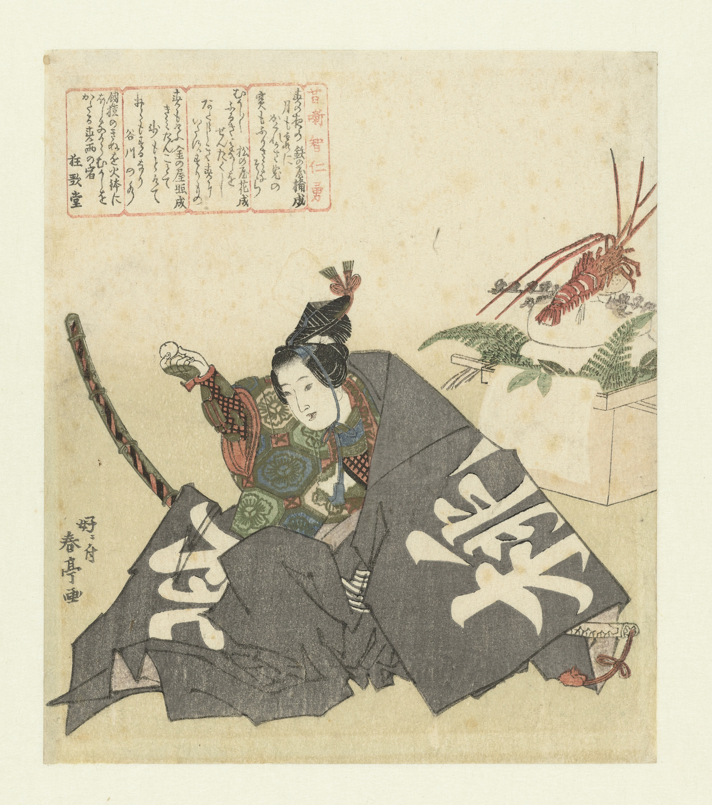 Een jonge Momotarô gekleed in hofkleding zit naast nieuwjaarsdecoraties van een rivierkreeft, ronde rijstkoeken (kagamimochi), varenbladeren (urajiro) en bladeren van de sinaasappel (daidai). Met vier gedichten. Label Line: mentioned on object Katsukawa Shuntei (1770 - 1820), 1821, kleurenhoutsnede; blinddruk; lijnblok in zwart met kleurblokken; metaalpigmenten Collection: prenten; Japan (collectie)